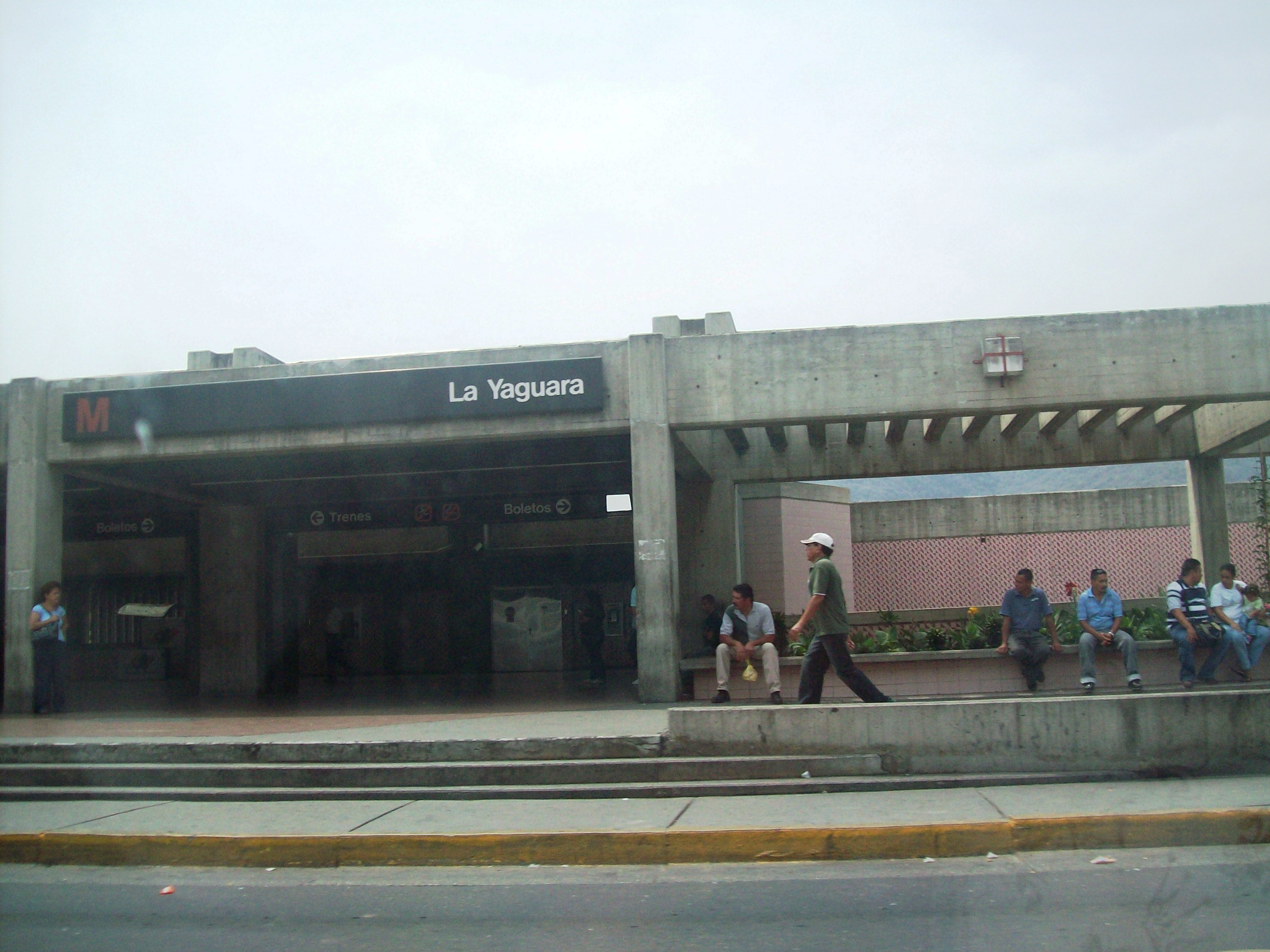 estacion la yaguara una imagen de la estacion la yaguara